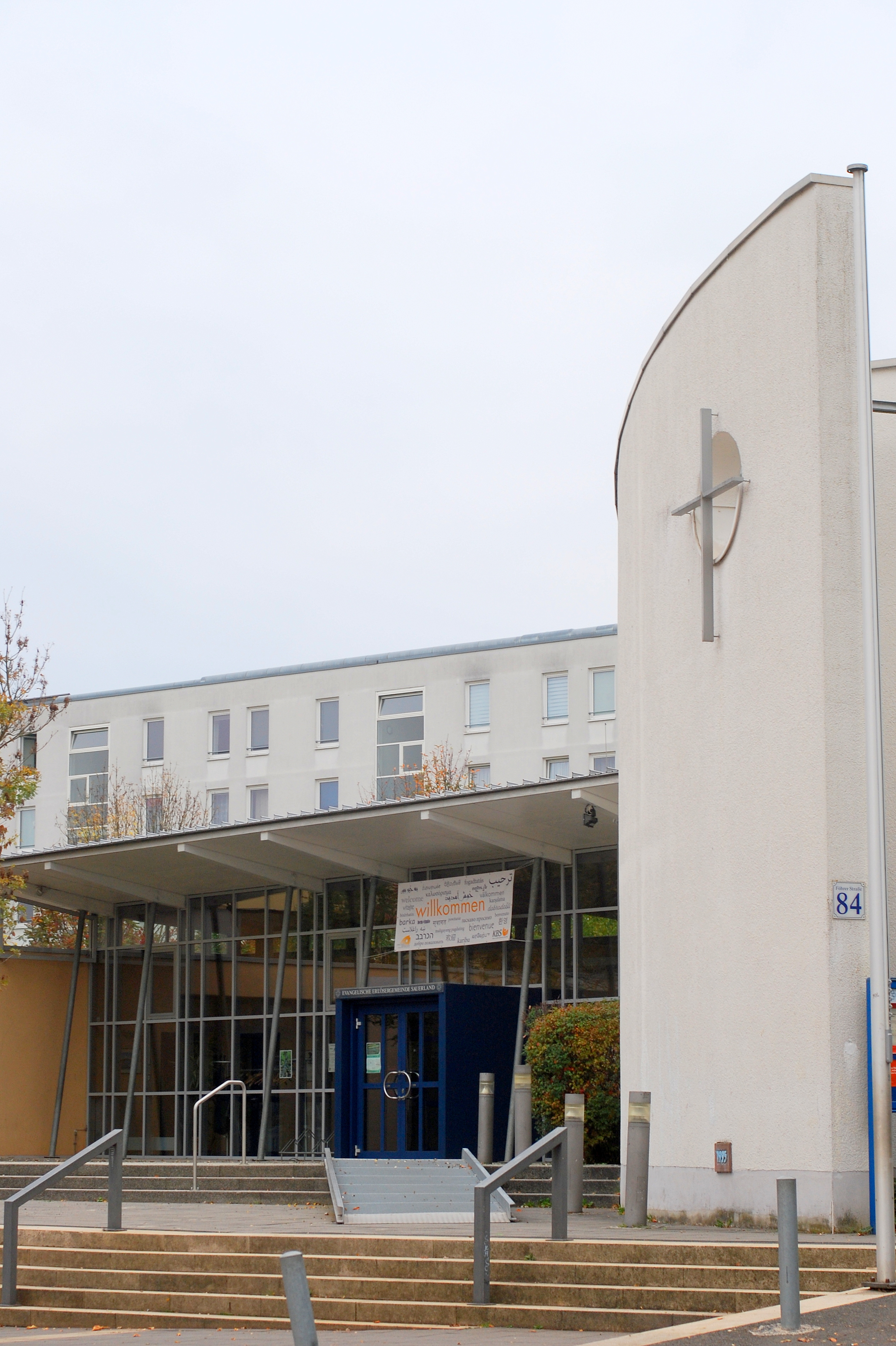 Ev. Erlösergemeinde, Wbn.-Sauerland, Einweihung 1998, Architekt Wolfgang Thrun